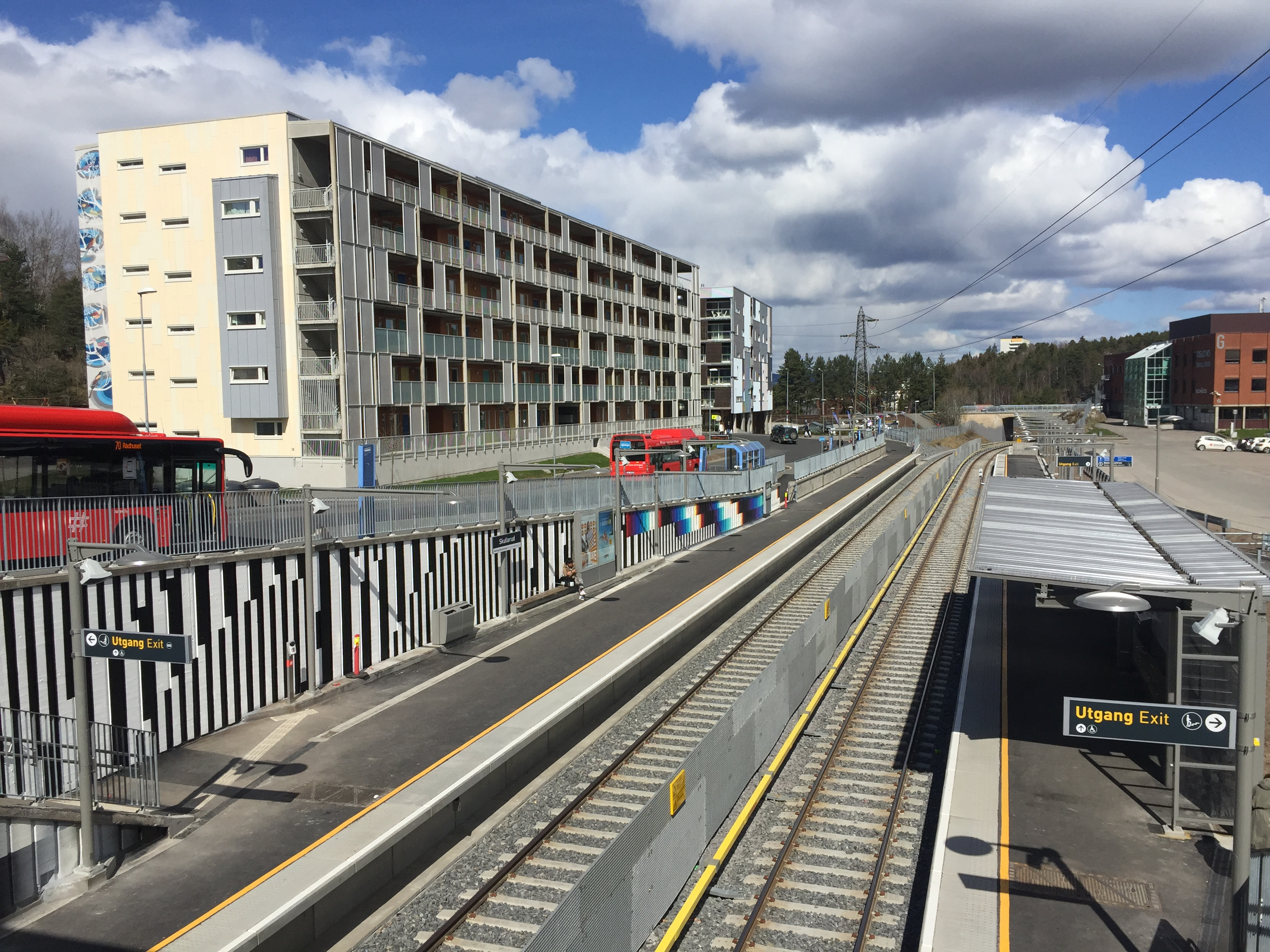 Skullerud t-banestasjon.